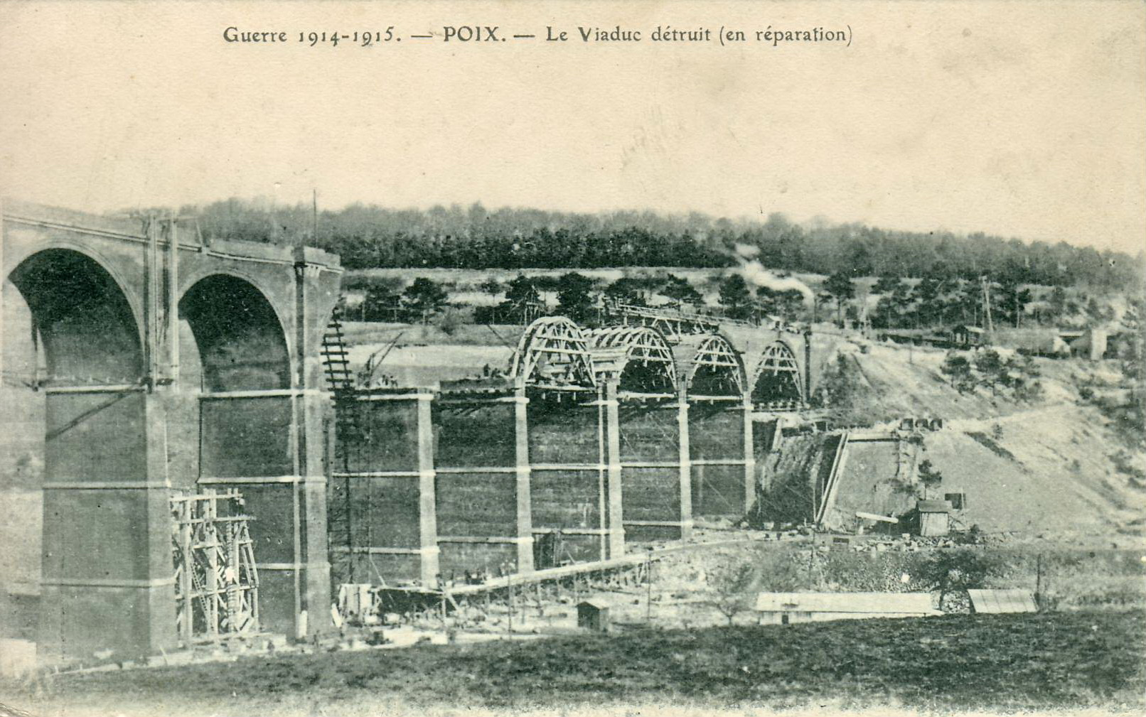 Carte postale ancienne Guerre 1914-1915 - POIX - Le viaduc détruit (en réparation) Ce viaduc, construit par la Compagnie de l'Ouest en 1866 pour la ligne Rouen (Saint-Sever) - Amiens (Saint-Roch), a été détruit le 31 août 1914 par le Génie français. Les 6 arches détruites sont photographiées ici lors de leur reconstruction de 1915. Le viaduc fut également détruit à deux reprises pendant la seconde guerre mondiale : le 6 juin 1940, par le Génie français qui fit sauter les arches 4, 5 et 6. La voûte 3 fut complètement disloquée. Les voûtes 2 et 7 furent légèrement fissurées. Après l'armistice, afin de rétablir la circulation, une entreprise allemande fut chargée d'établir un pont provisoire de 80 m et composé de 4 tabliers en fer. La circulation a été rétablie de manière provisoire le 12 septembre 1940, à voie unique et avec une limitation de vitesse de 10 km/h. La réparation définitive prit 10 mois. Le viaduc fut bombardé le 14 janvier 1944, endommageant la voute N°5 et interrompant à nouveau la circulation ferroviaire. L'aspect du viaduc a été modifié par la SNCF en 1969, avec le remplacement des gardecorps en maçonneries par des barrières métalliques.